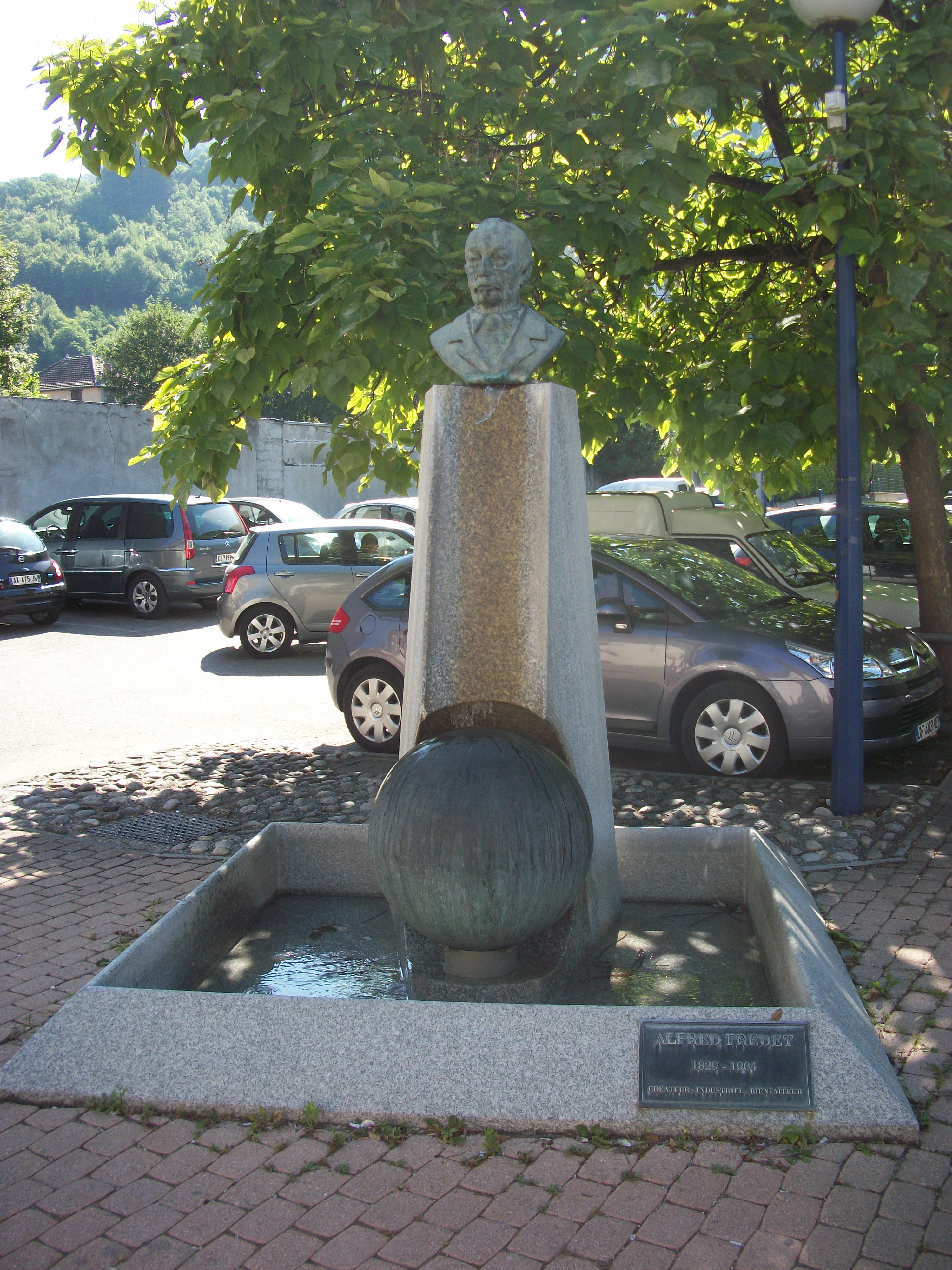 Villard-Bonnot, fontaine à la mémoire d'Alfred Fredet Object location45° 15′ 28.15″ N, 5° 54′ 28.22″ E